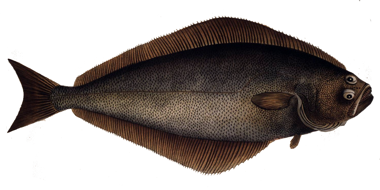 Hippoglossus hippoglossus